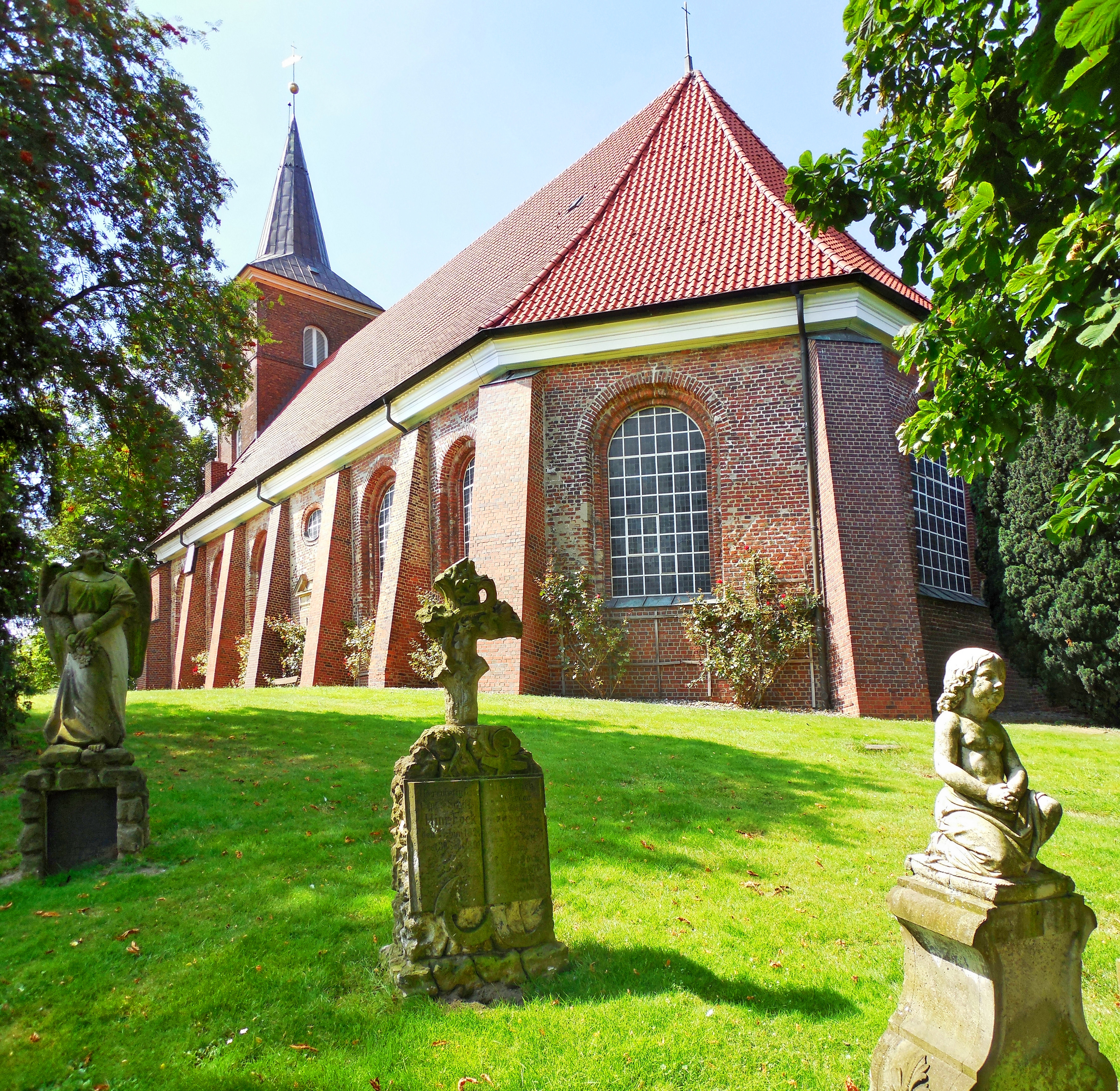 Organistenweg, 21129 Hamburg, Germany